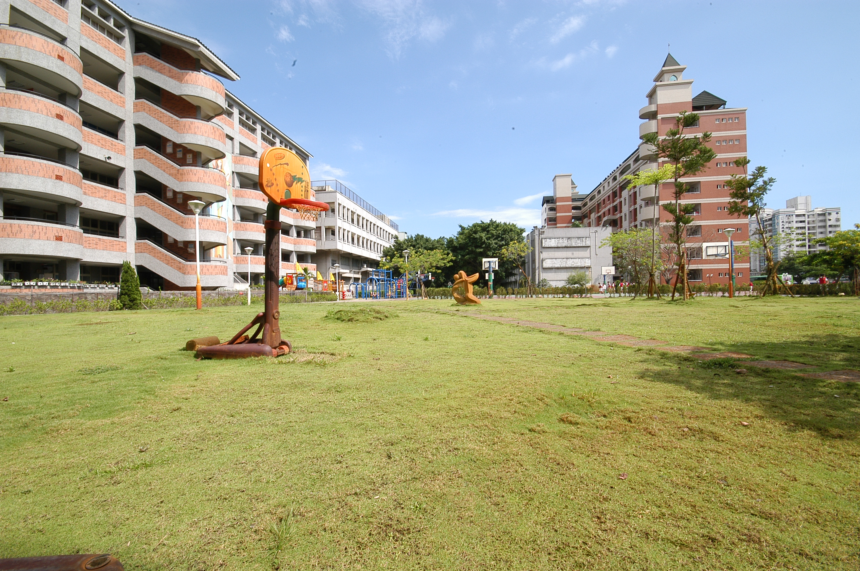 校園景色